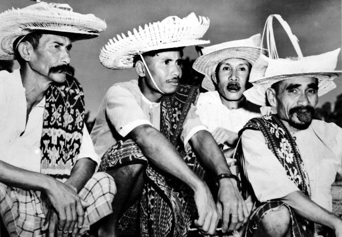 Repronegatief. Notabelen van het eiland Roti